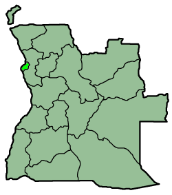 A map from province Luanda, Angola